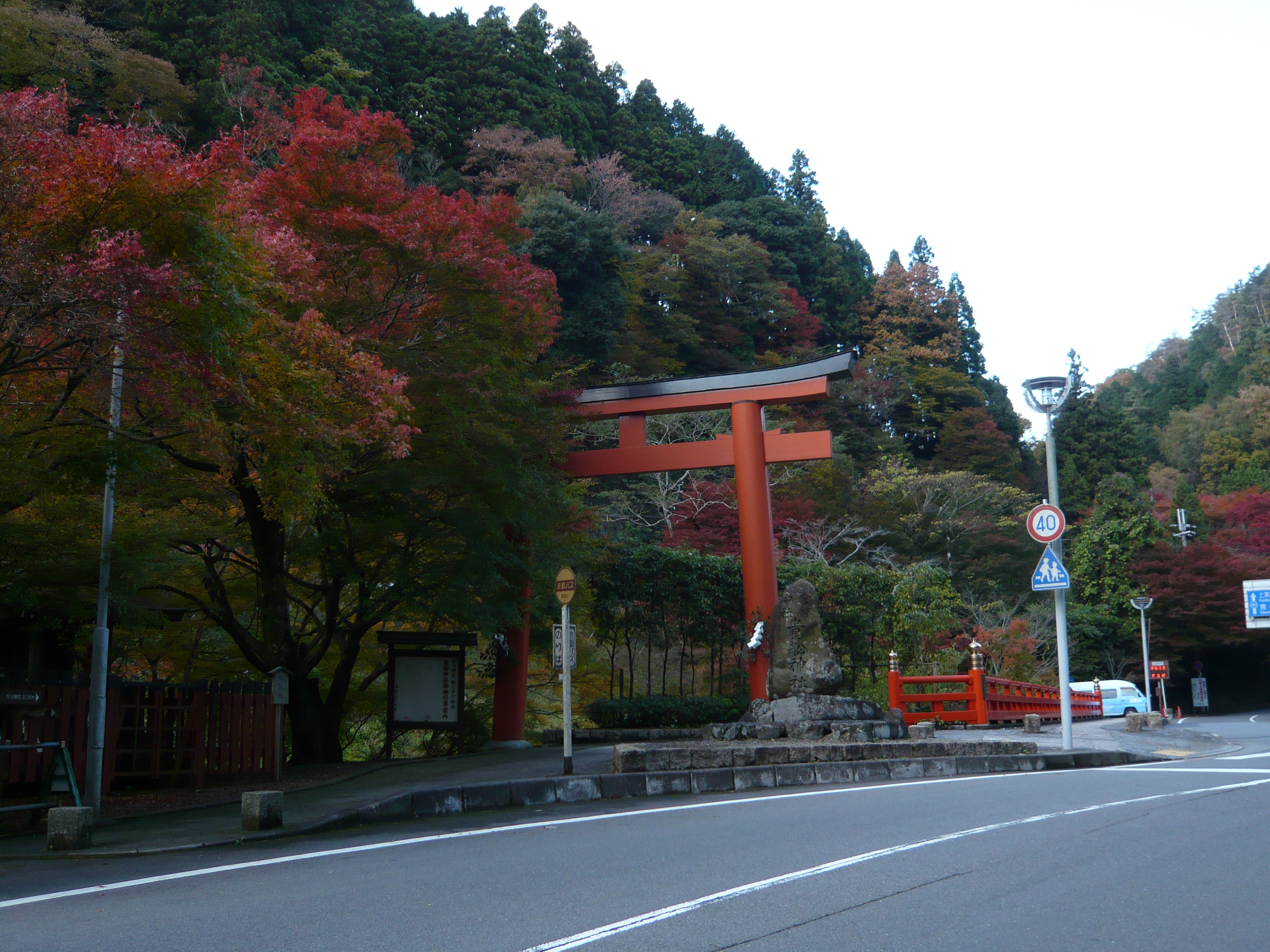 Kifune-jinja, Sakyō, Kyōto, Japan 貴船神社（京都市左京区）一の鳥居